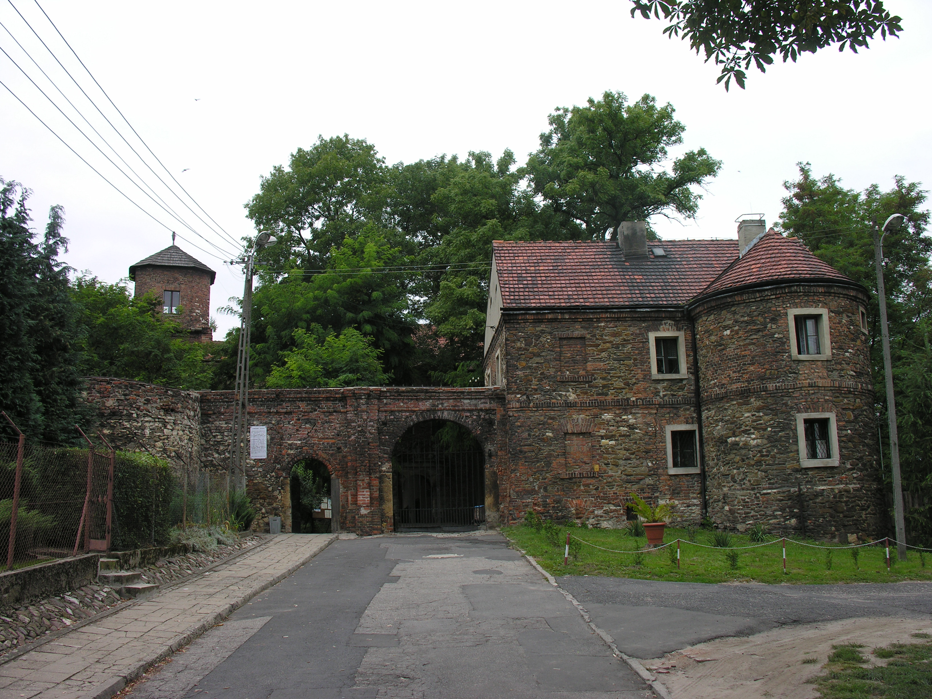 Brama do zamku w Toszku